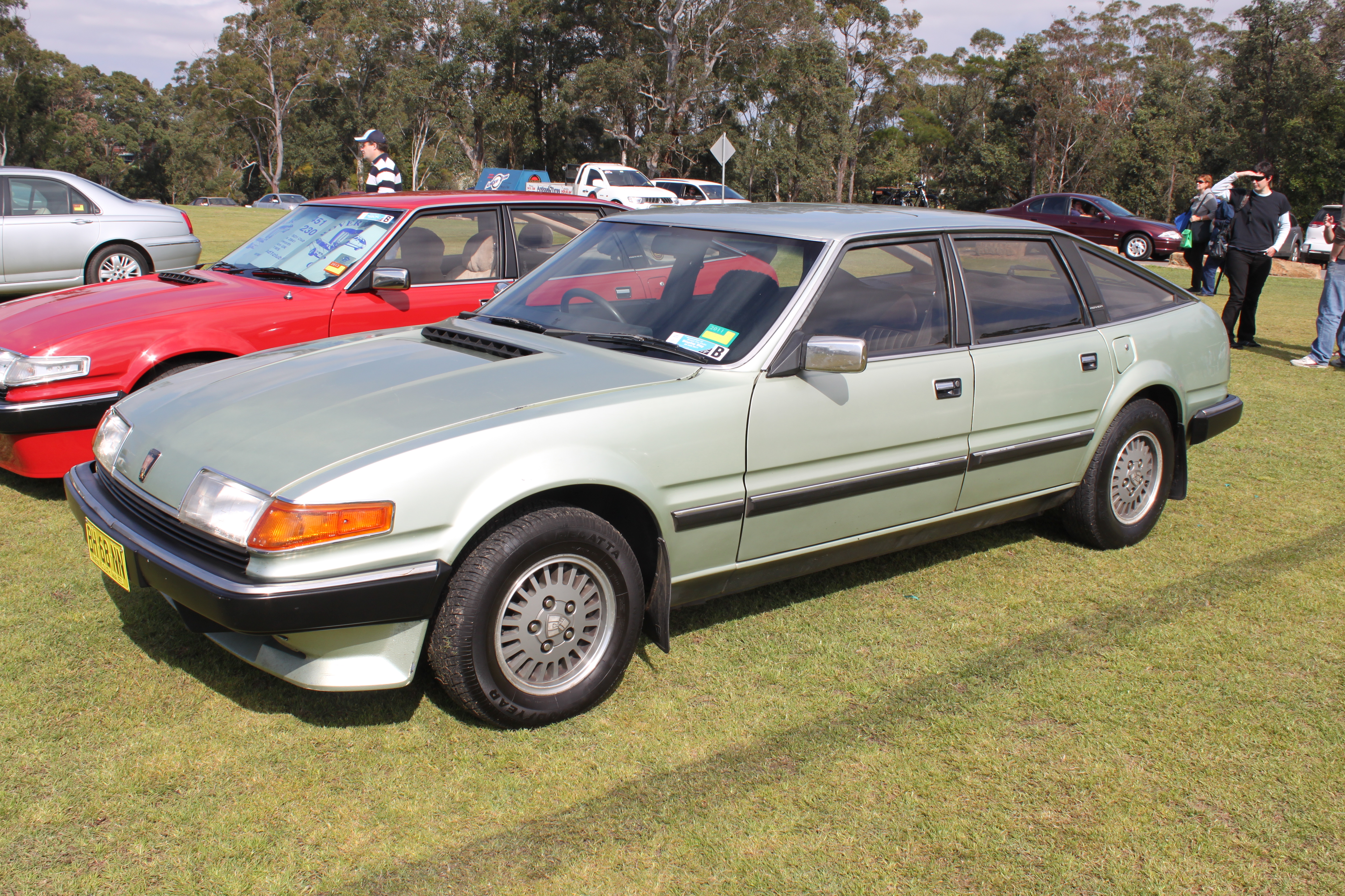 Rover 3500 SD1